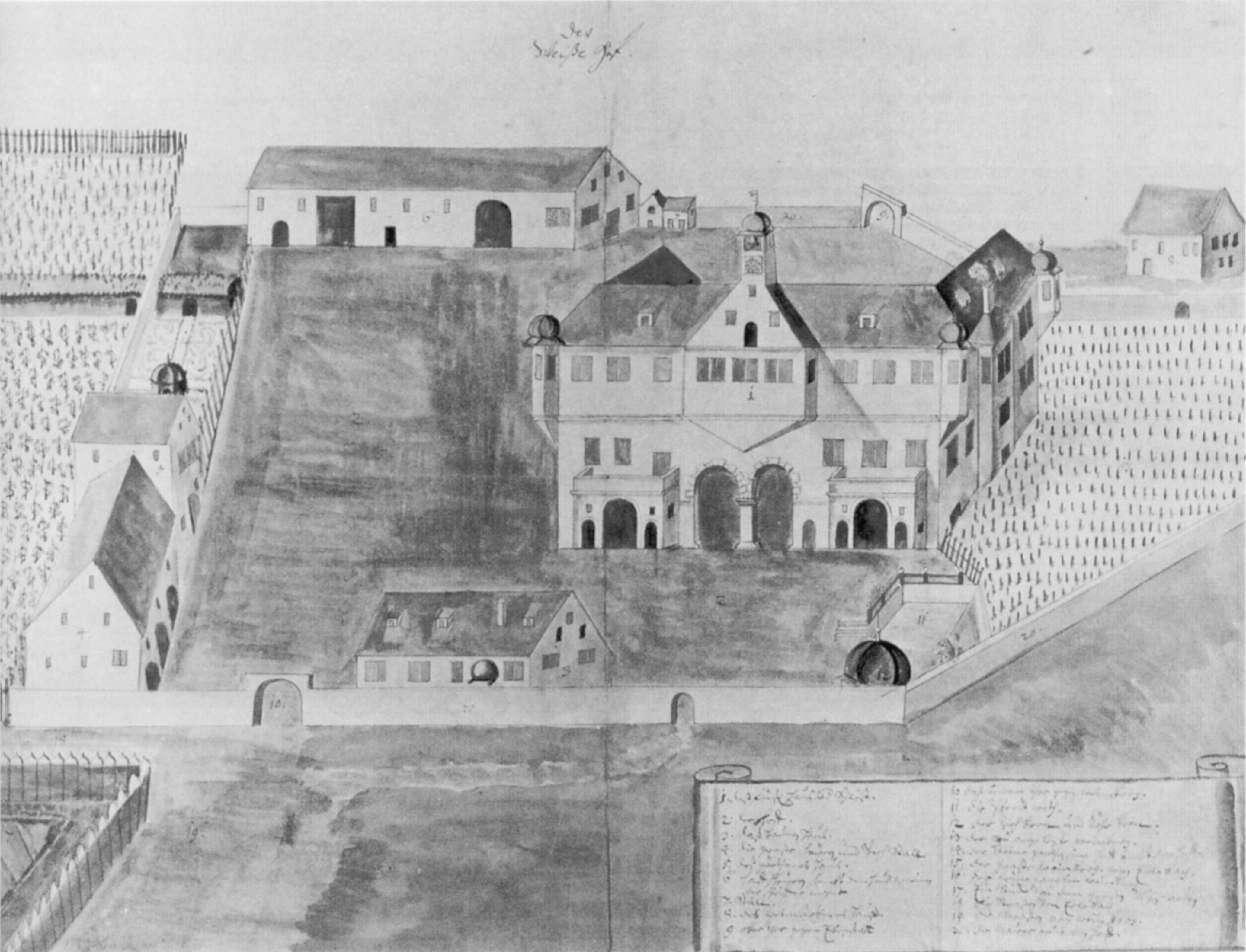 Der weiße Hof. Ansicht des Weißenhofs bei Weinsberg, um 1715/1725. Hohenlohe-Zentralarchiv Neuenstein, Plansammlung VI, 116